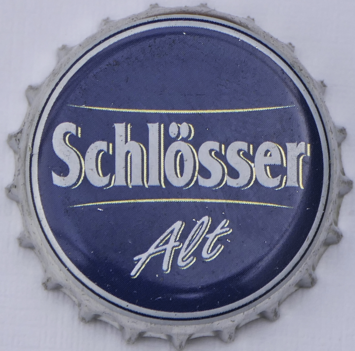 Ein Kronkorken der Brauerei Schlösser - Schlösser Alt, von 2019.